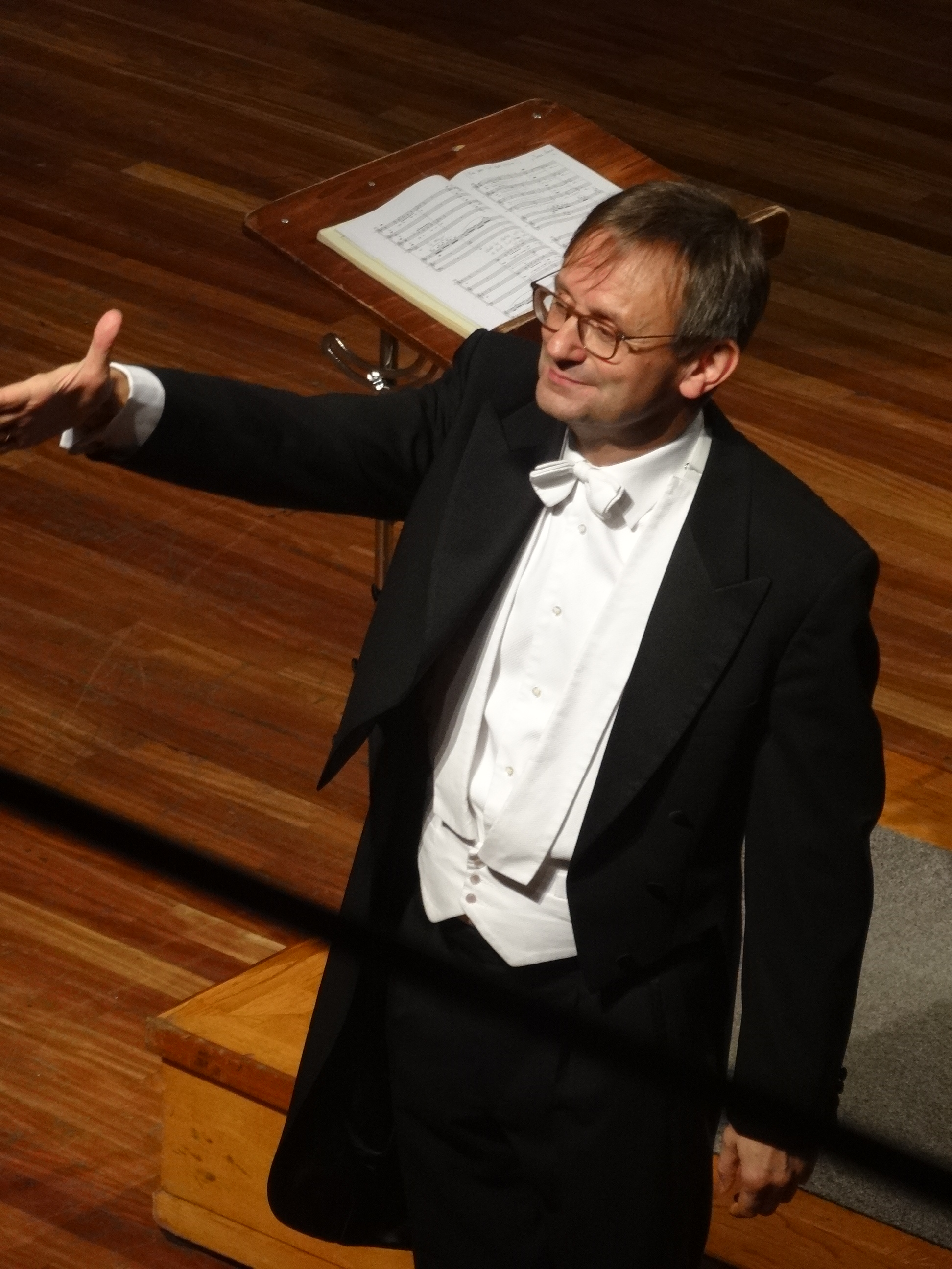 Director Simon Halsey. Palau de la Música Catalana, 26 de novembre de 2016. Concert Requiem de Fauré. Orfeo Català - Cor de Cambra del Palau de la Música Catalana